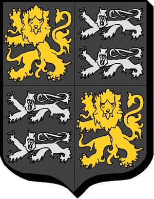 Blason de la famille Brocas of Beaurepaire & Roche Court, noblesse britannique, originaire d'Aquitaine en France au XIVe siècle.